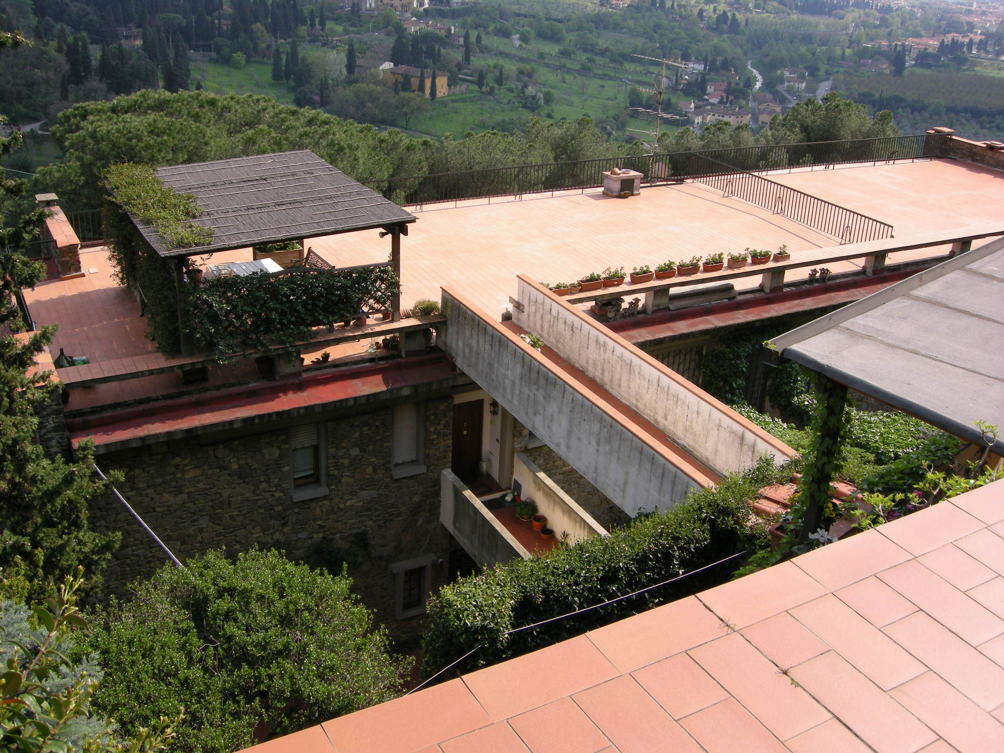 Complesso di monterinaldi